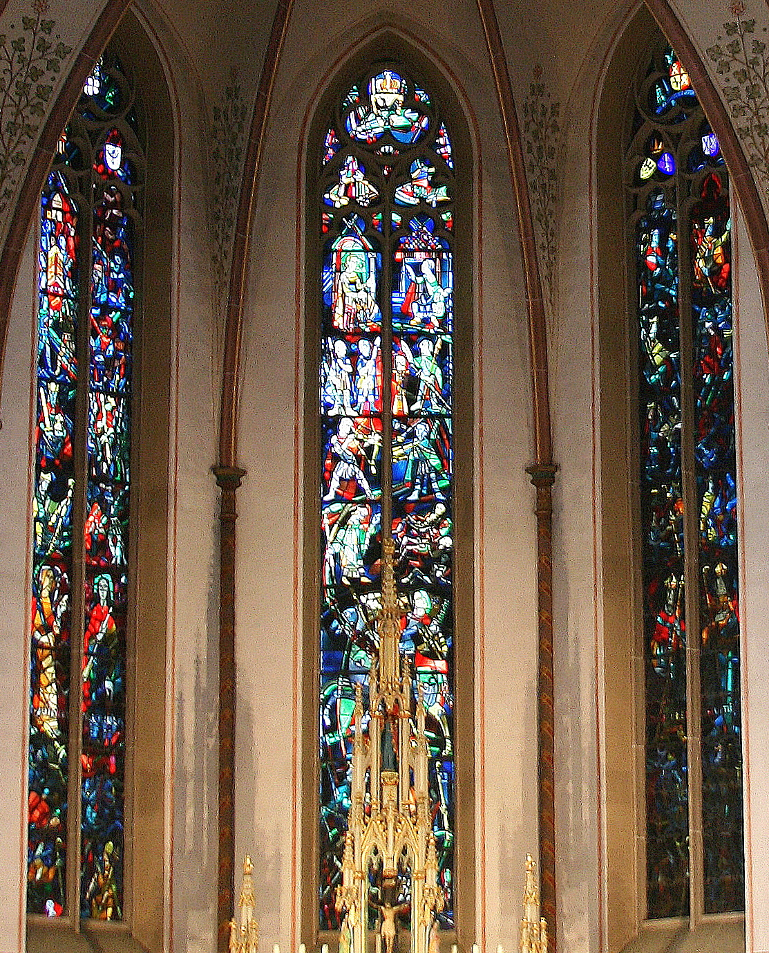 St. Mauritius (Hattingen), moderne Buntglasfenster nach Entwürfen von W.de Graaf im Chorraum